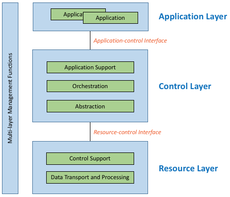 Монгол: 3layers